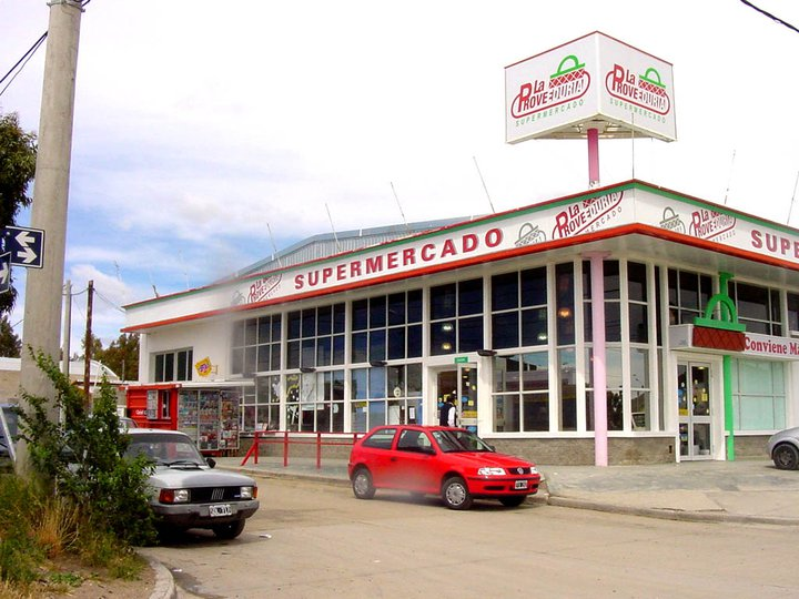 prospero palazzo